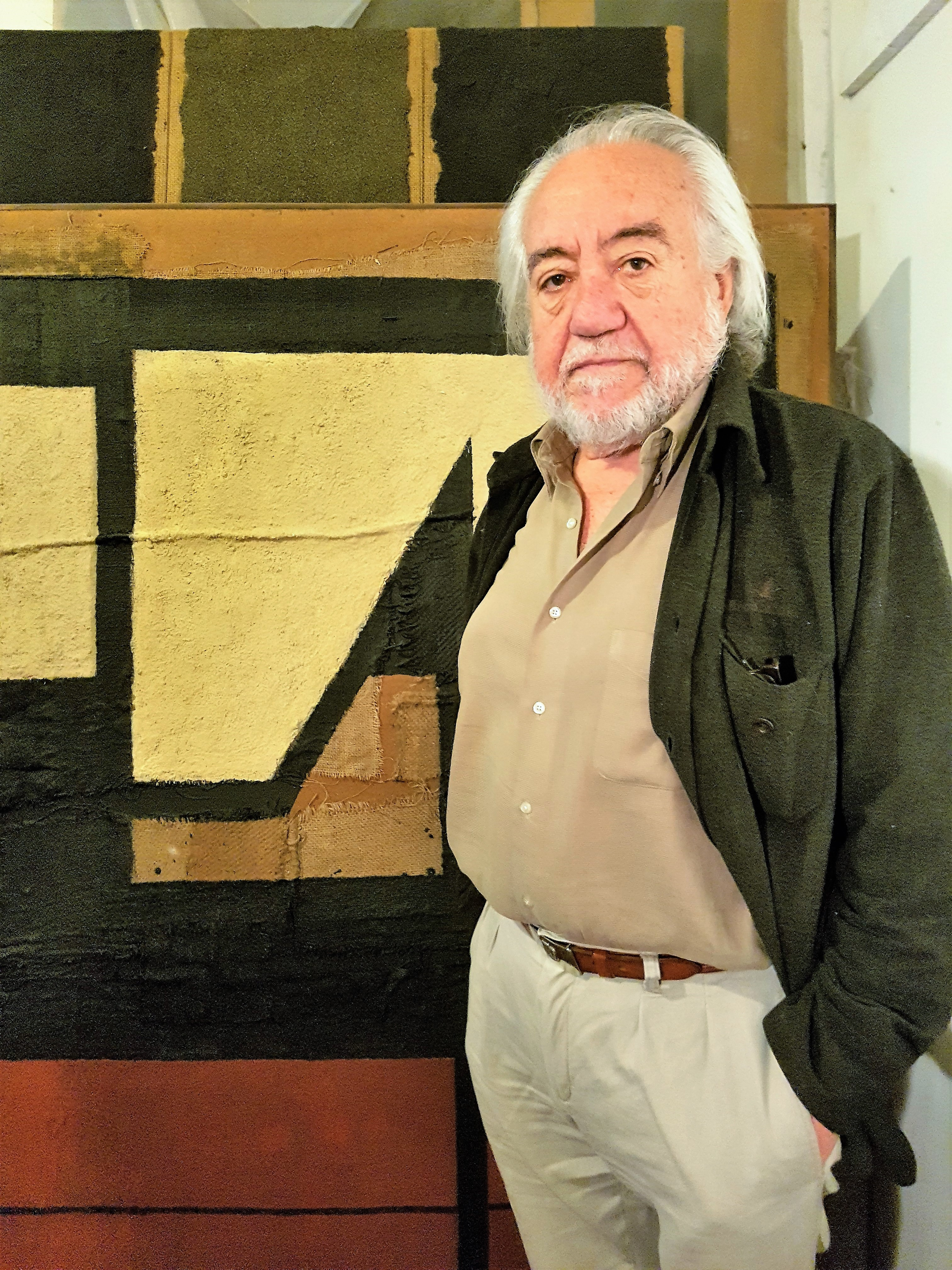 El pintor y escultor chileno Patricio Court junto a una de sus obras en su taller de avenida La Paz 257, Santiago